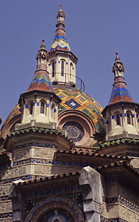 Iglesia Sant Romà, en Lloret de Mar (Girona, Spain)